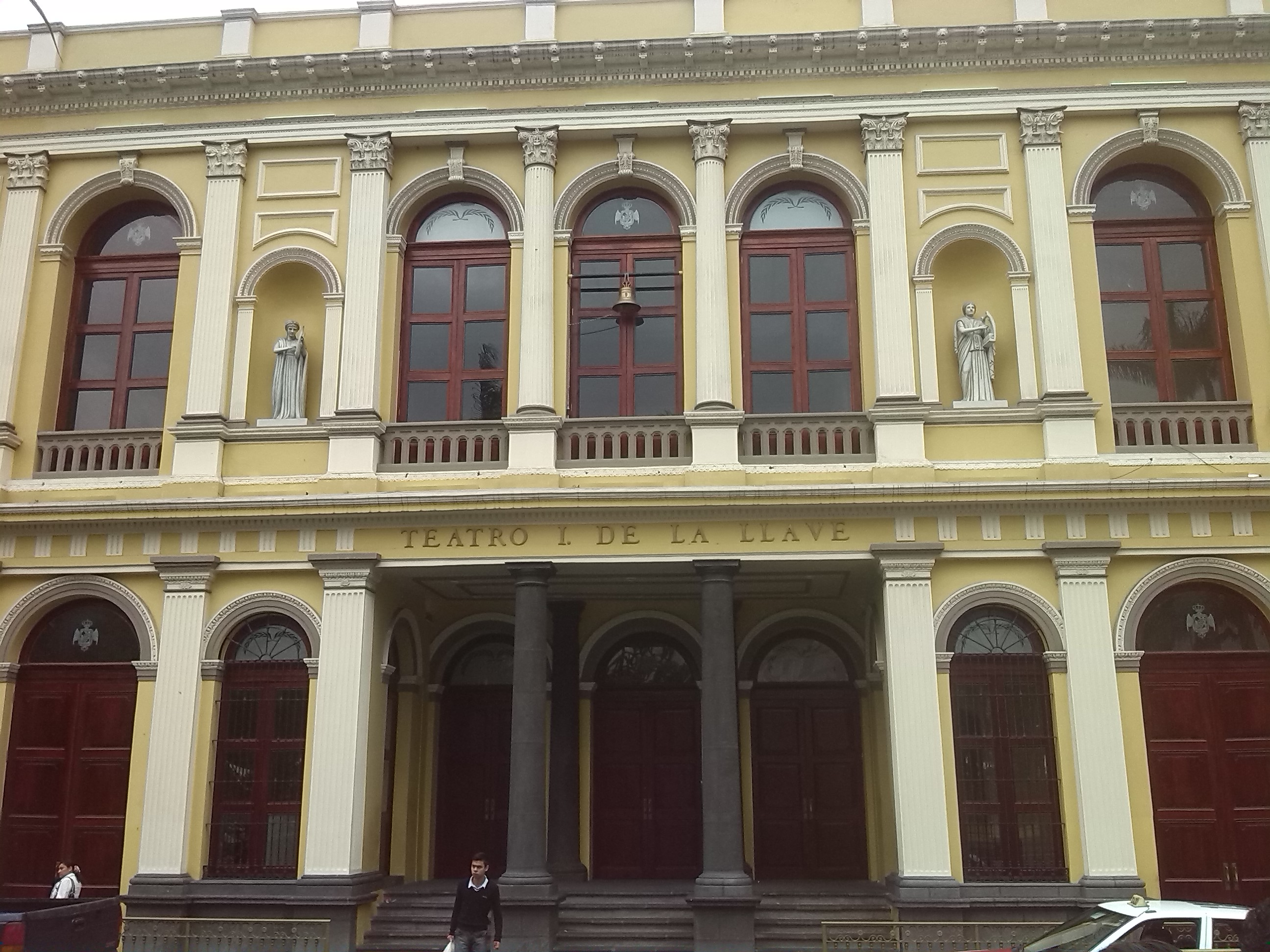 Teatro Ignacio de la Llave, Orizaba, Ver.